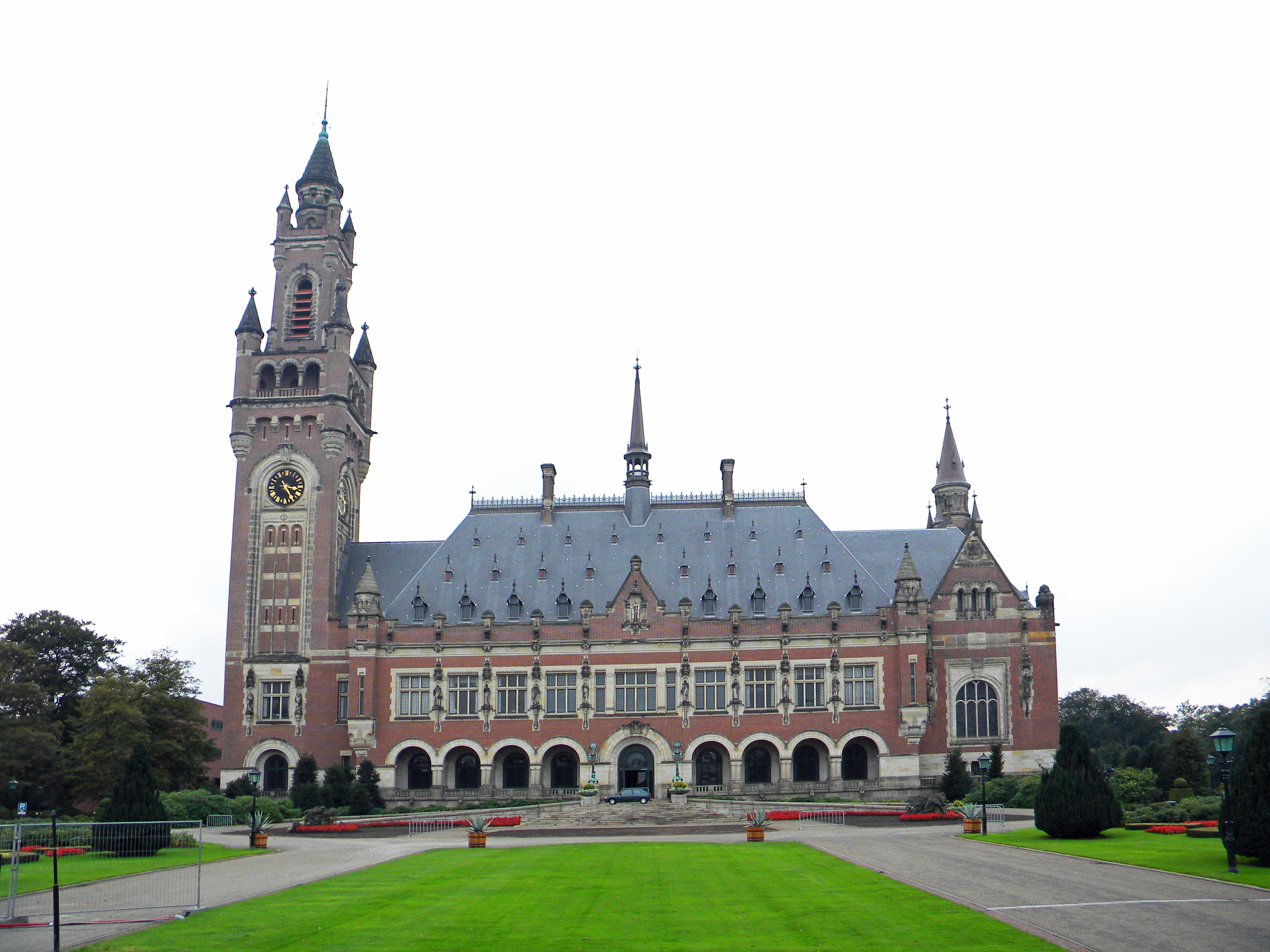 Friedenspalast